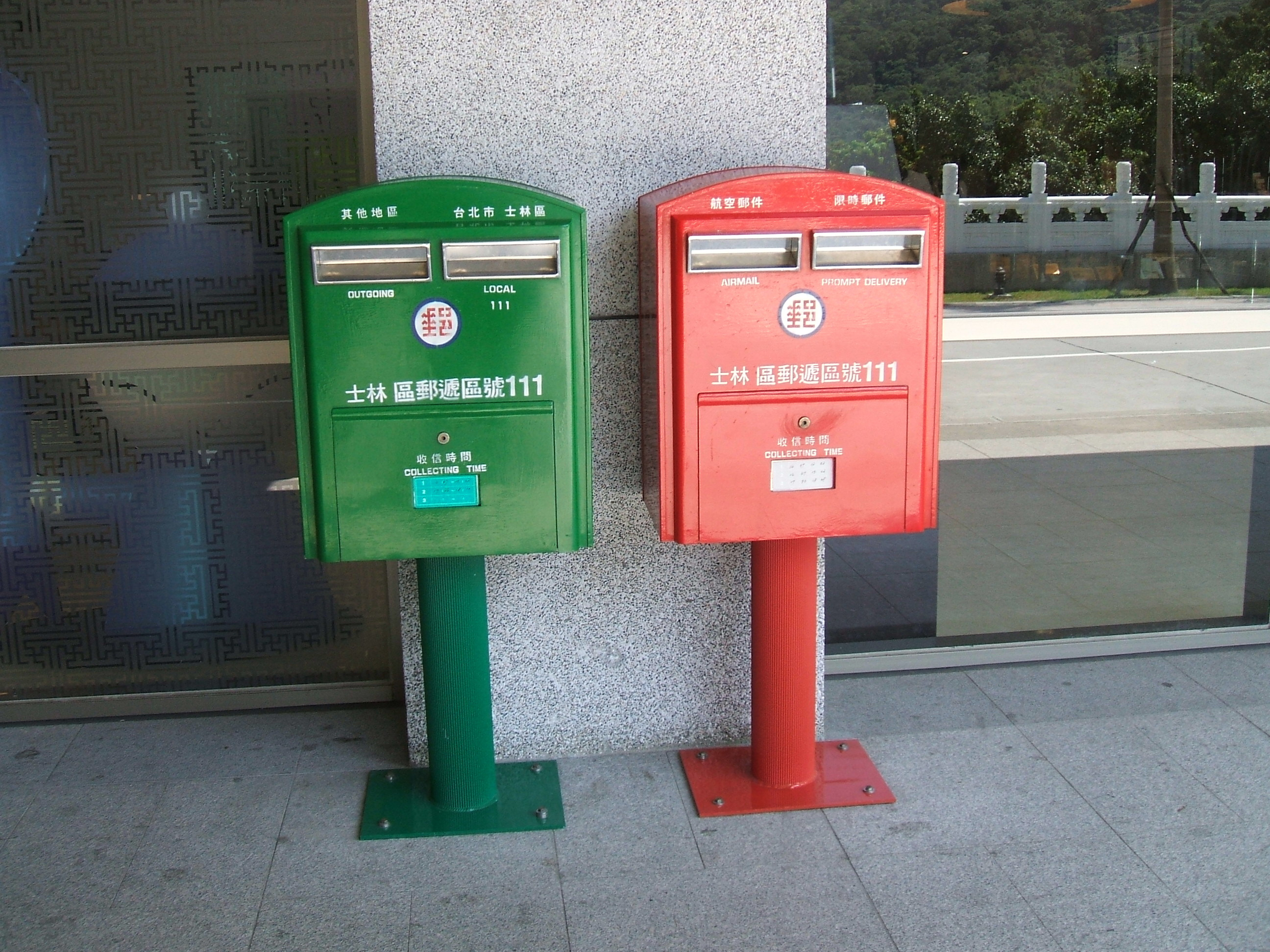 臺北市士林區國立故宮博物院前的中華郵政郵筒。